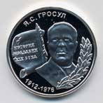 Пам'ятна монета ПМР з зображенням Якима Гросула